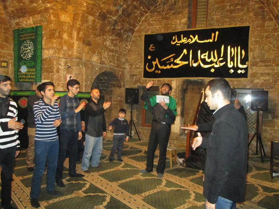 Həzrəti Əli məscidində Məhərrəmlik